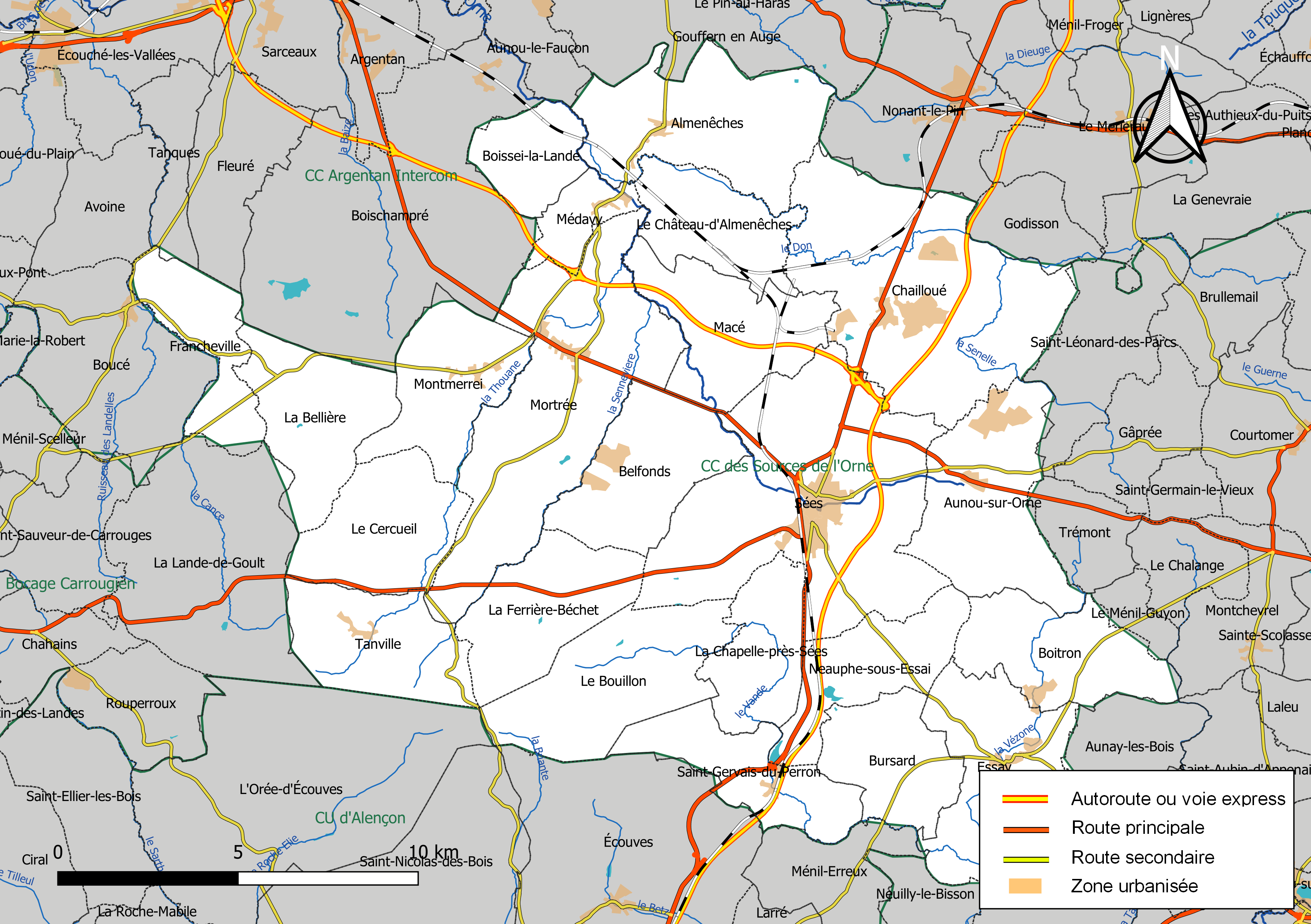 Carte géographique de la Communauté de communes des Sources de l'Orne, département de l'Orne, France. Composition au 1er janvier 2019.